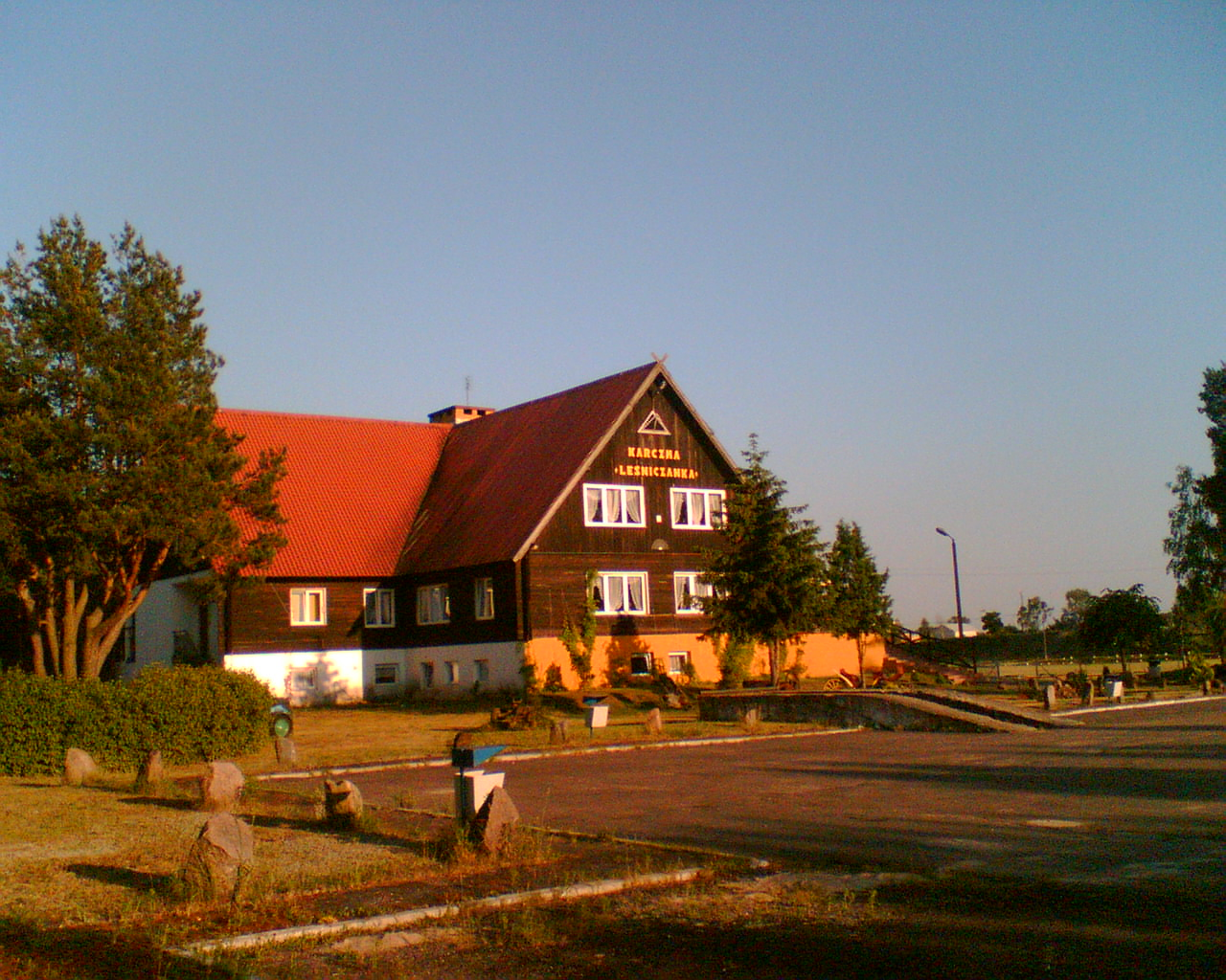 Karczma "Leśniczanka"